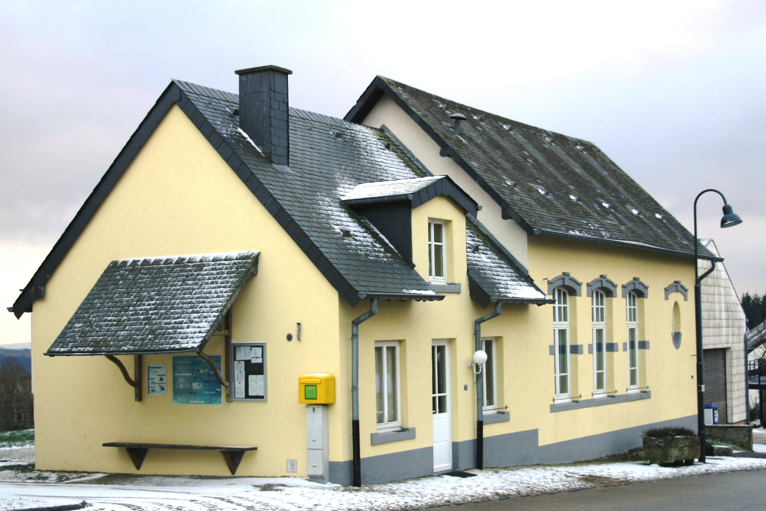 Déi al Schoul zu Kaalber.